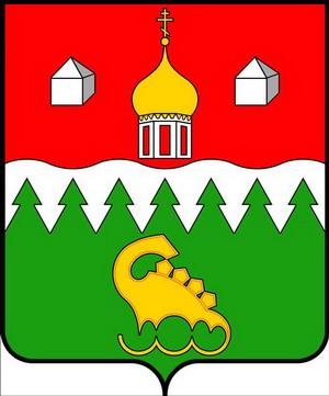 Герб Котласского муниципального района (Архангельская область)